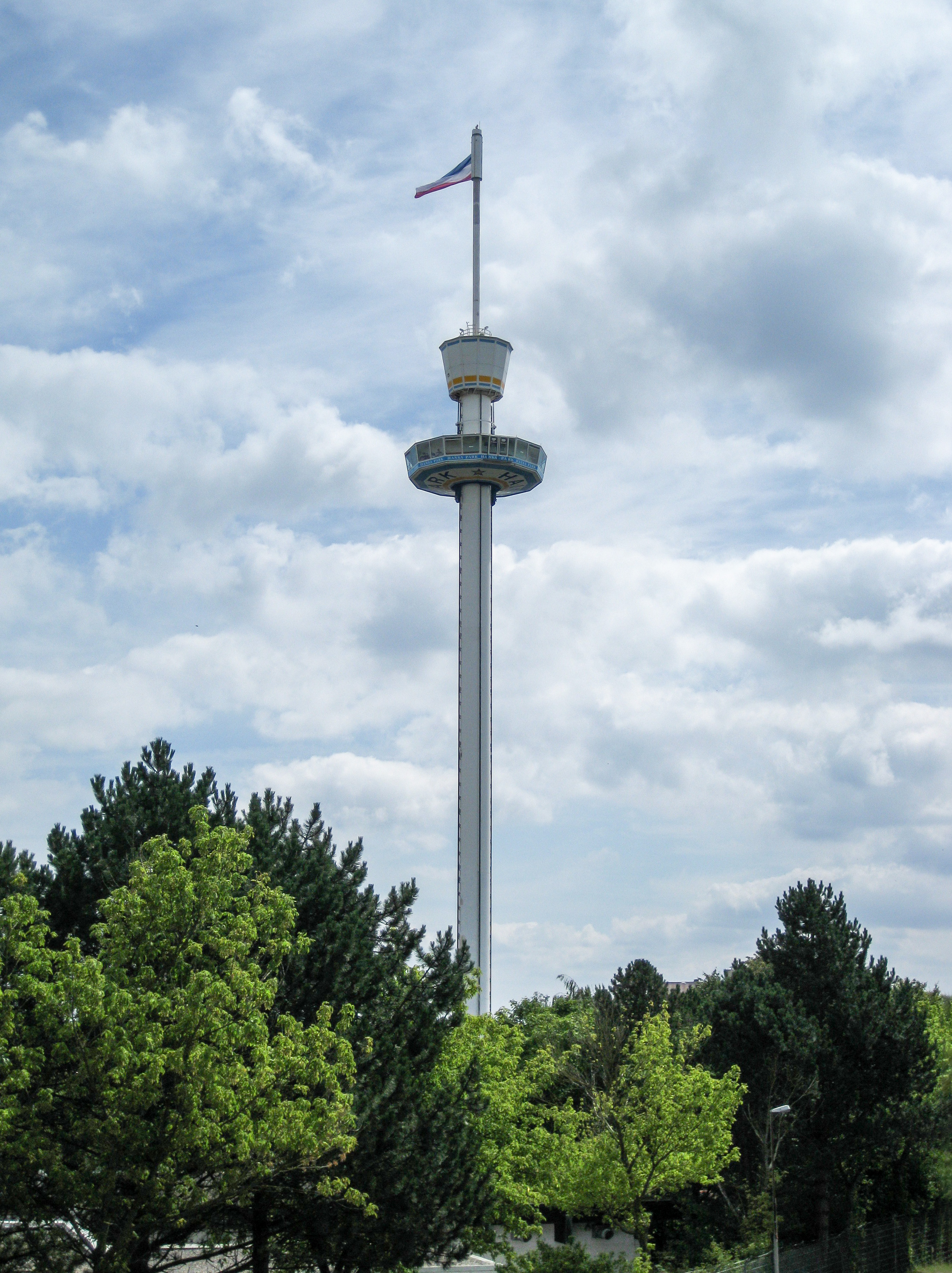 Der Holsteinturm im Hansa-Park in Sierksdorf, Schleswig-Holstein, Deutschland, erbaut 1988 von Huss Rides (Bremen). Der Turm ist ein 100 Meter hoher Gyro-Tower. Aufgenommen von der Fußgängerbrücke vor dem Eingangsbereich zum Hansa-Park